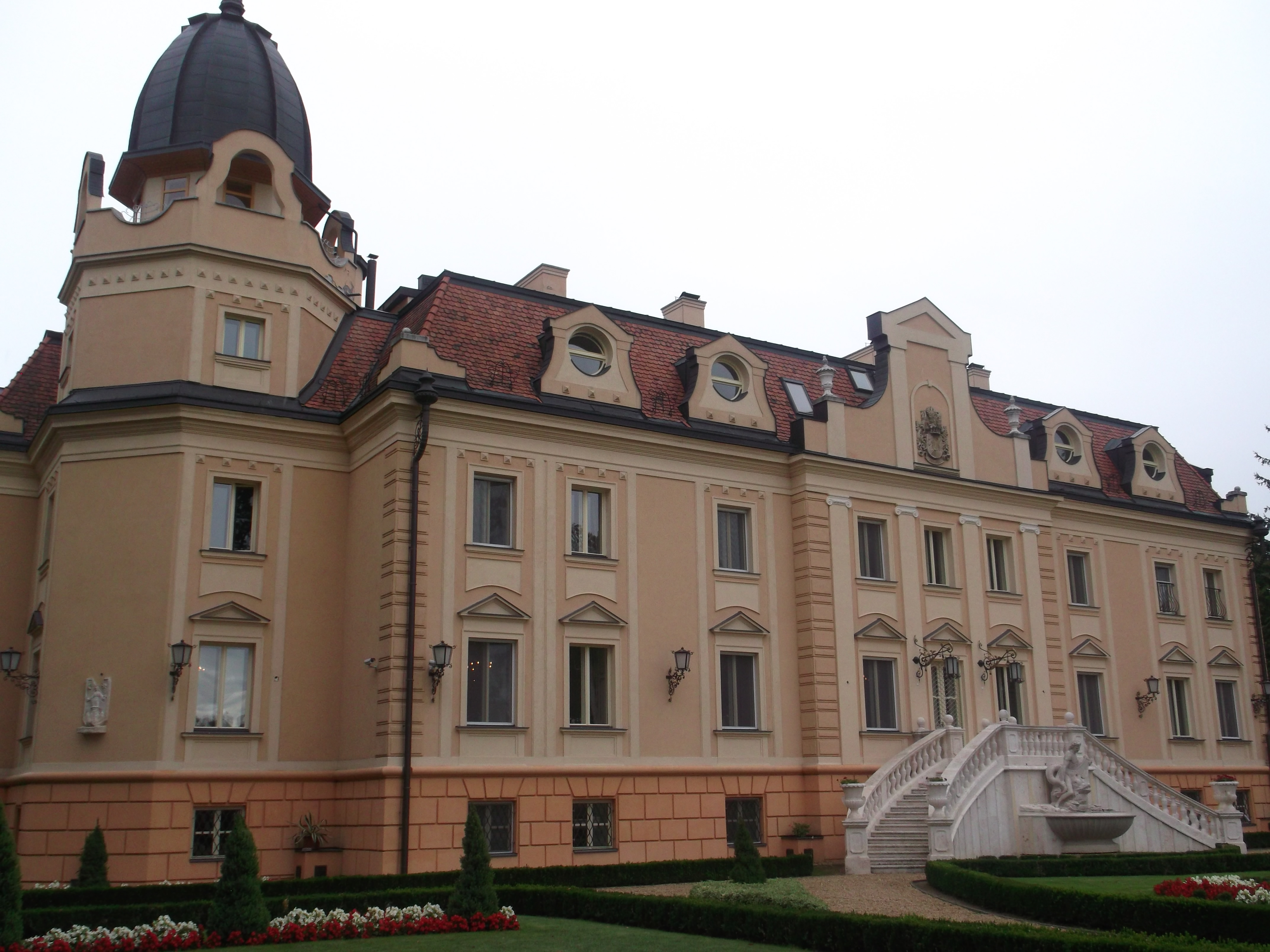 Szapáry Kastély Sorokpolány 2013 Sept. This is a photo of a monument in Hungary. Identifier: 9325